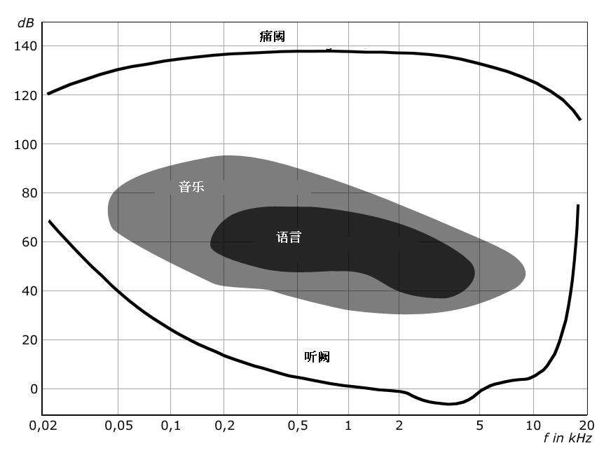 聽覺面積，依據德語維基中的自由圖像Hoerflaeche.png（現為Commons的Hoerflaeche.svg）翻譯